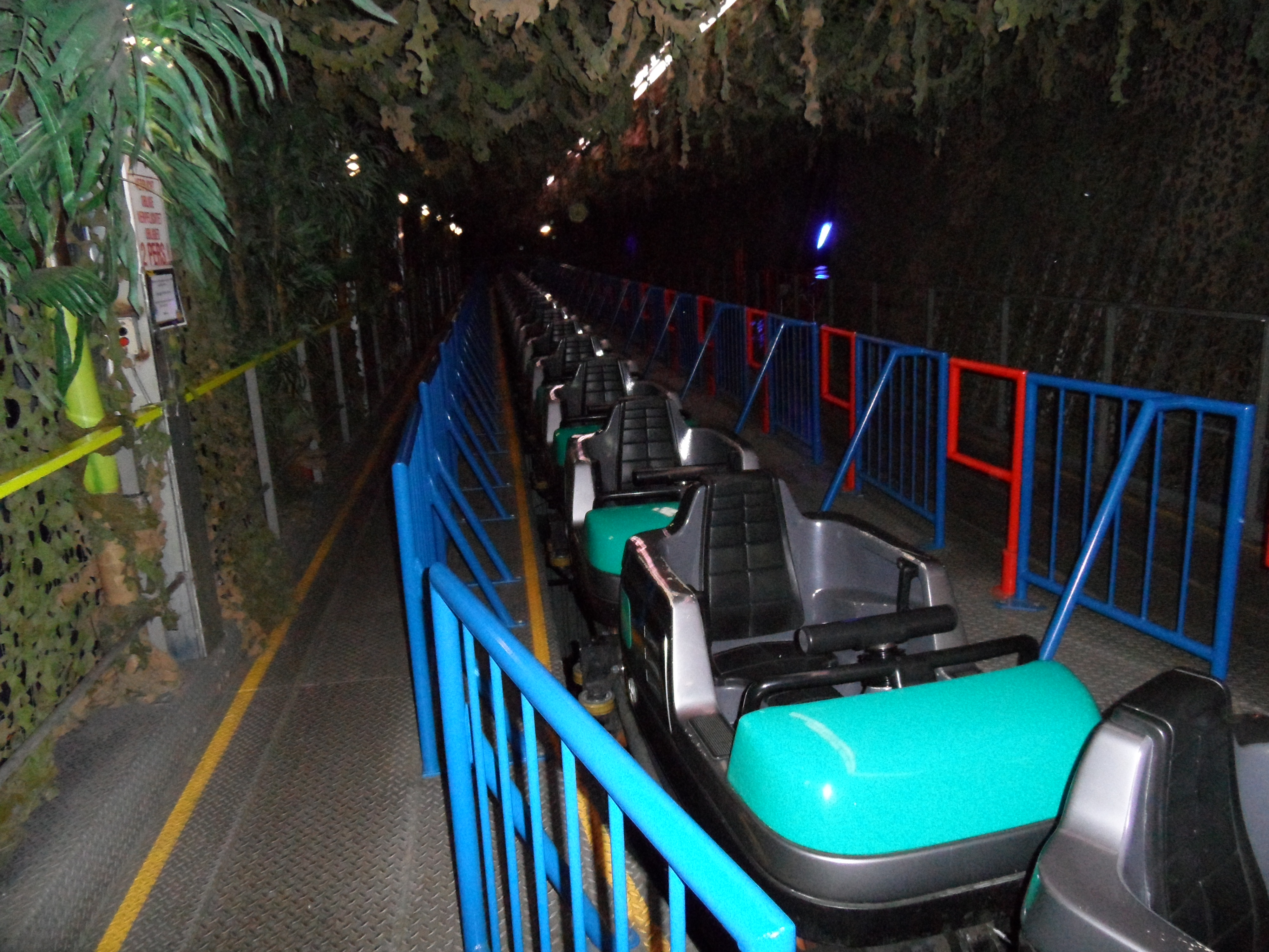 achtbaantrein